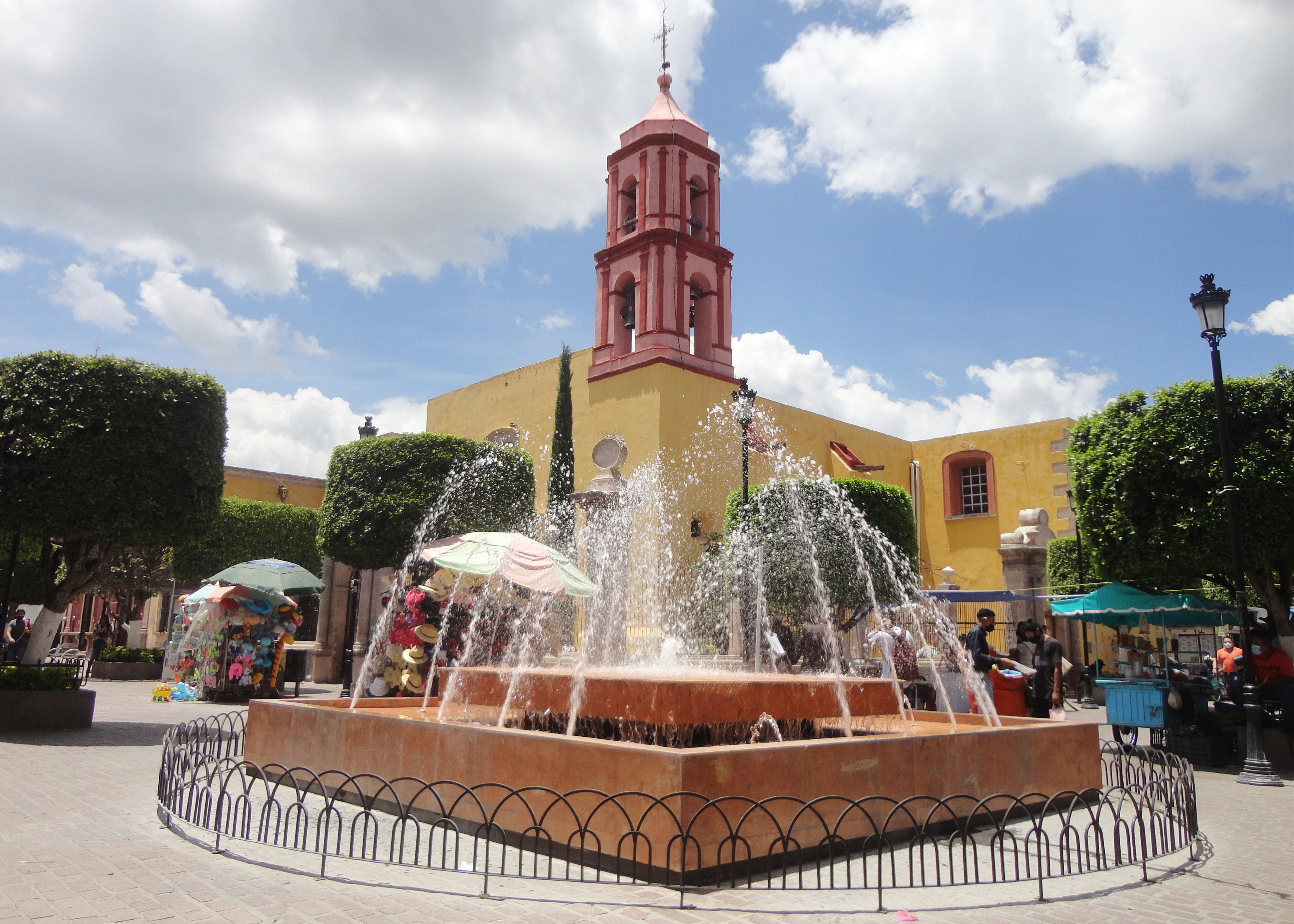 Templo de la Tercera Orden - Silao, Guanajuato, México.